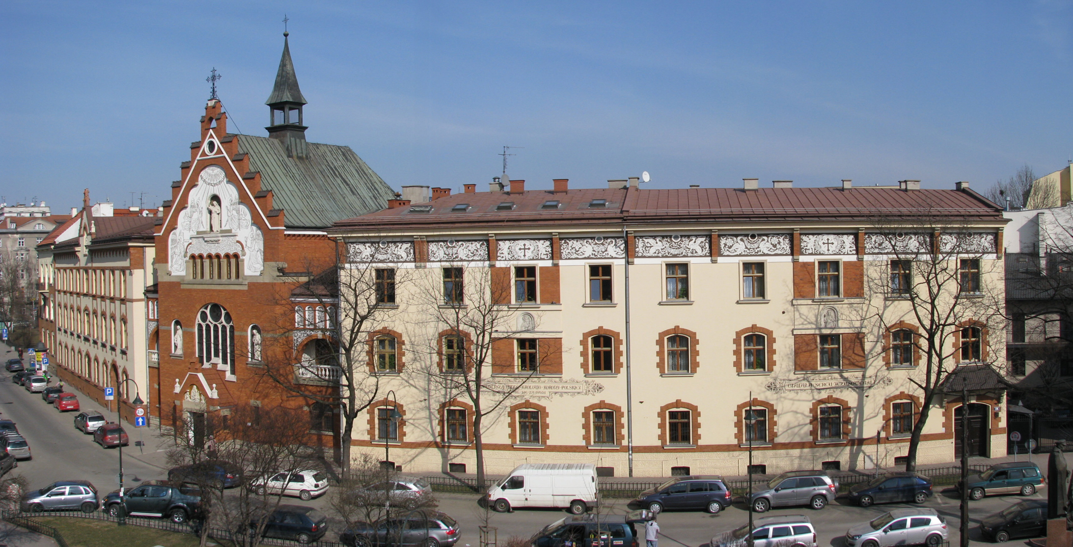 Klasztor Sióstr Sercanek w Krakowie